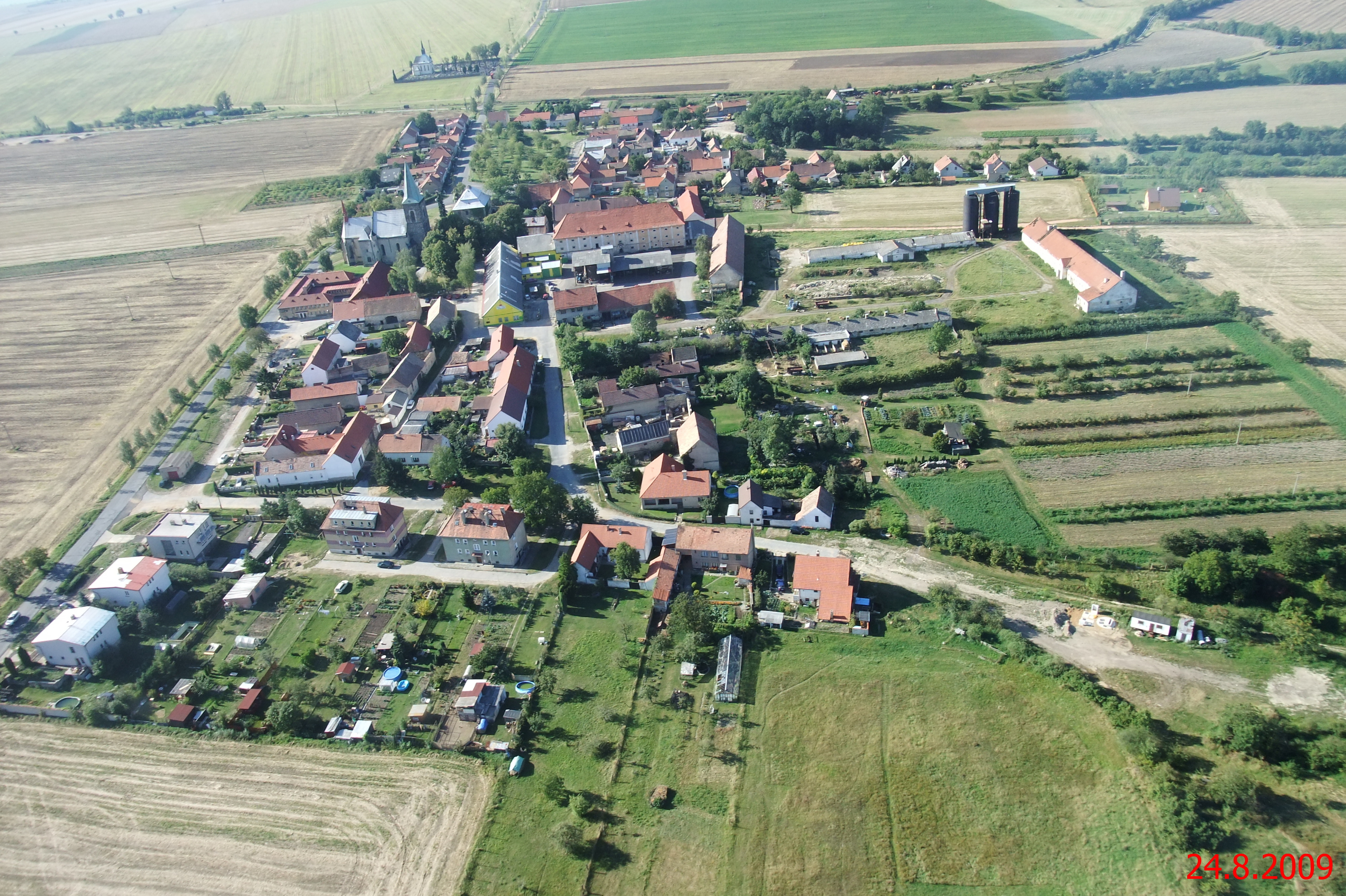 Charvatce pohled od severu